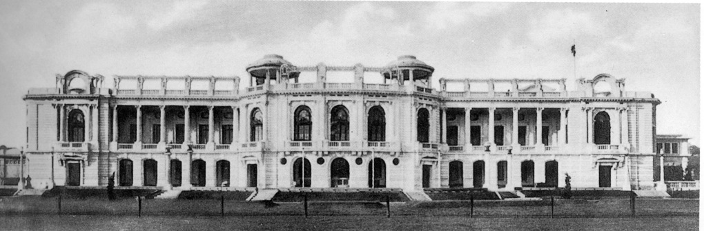 中文（中国大陆）: 上海法国总会旧照